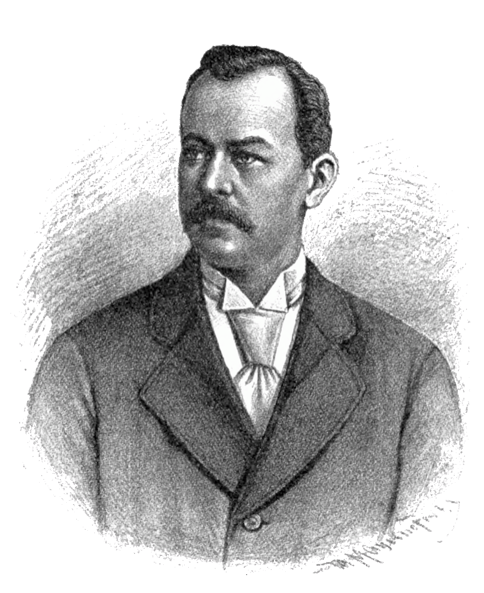 Janko Veselinović (Јанко Веселиновић; 1862–1905), Serbian writer